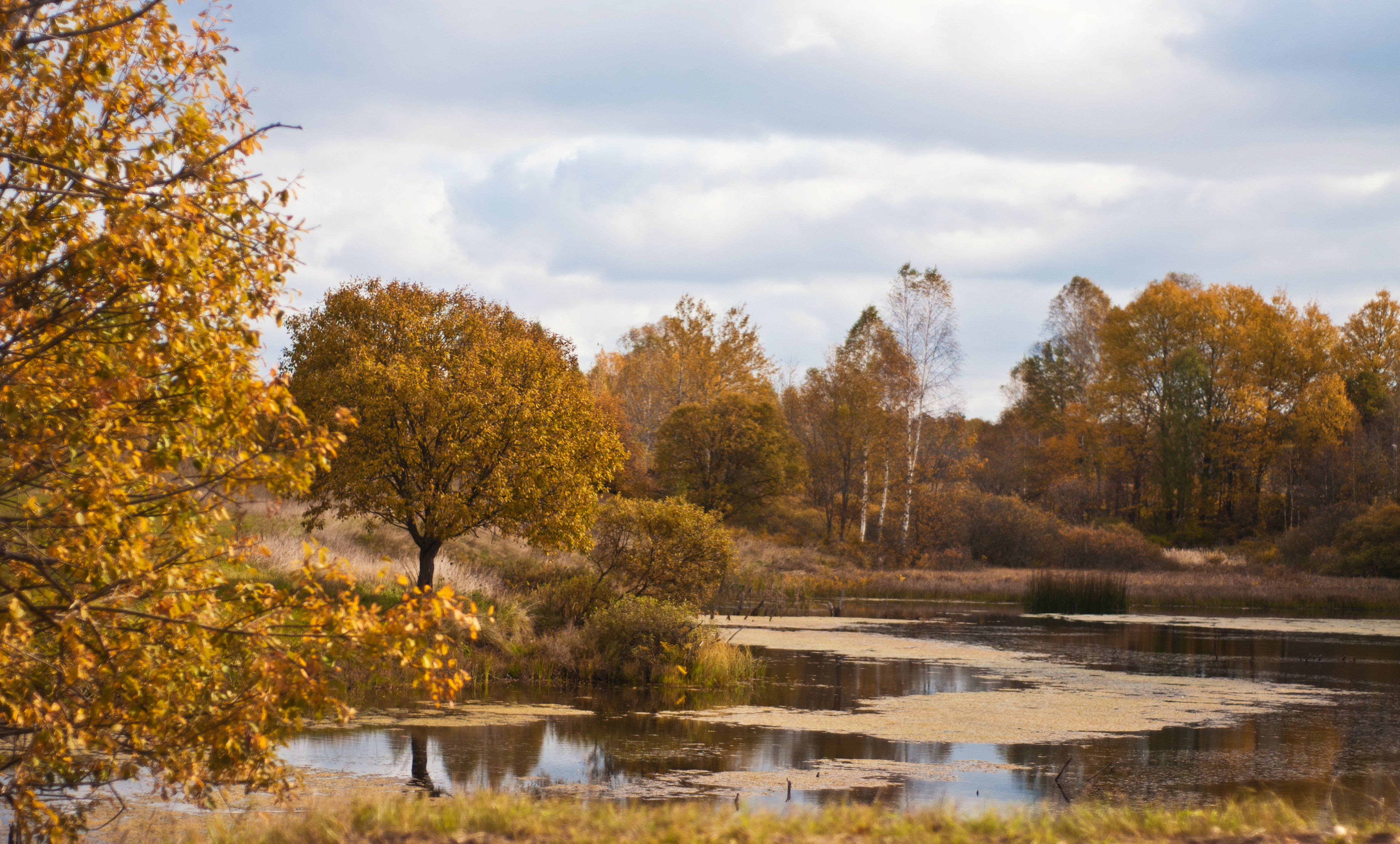 Посадки лип в поселке Первомайском, Шумячский район This image is related to the protected area of Russia number 6720205